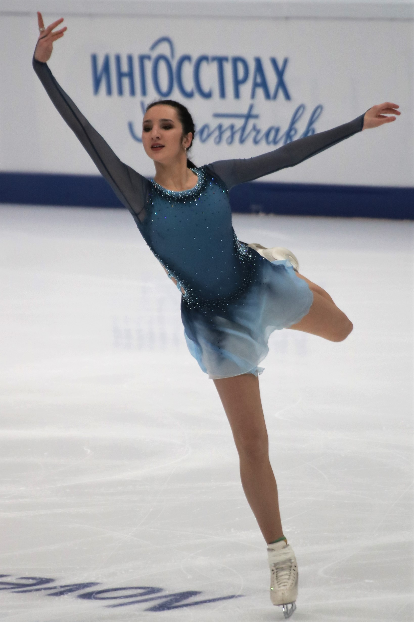 Полина Цурская (Россия) на Rostelecom Cup 2018